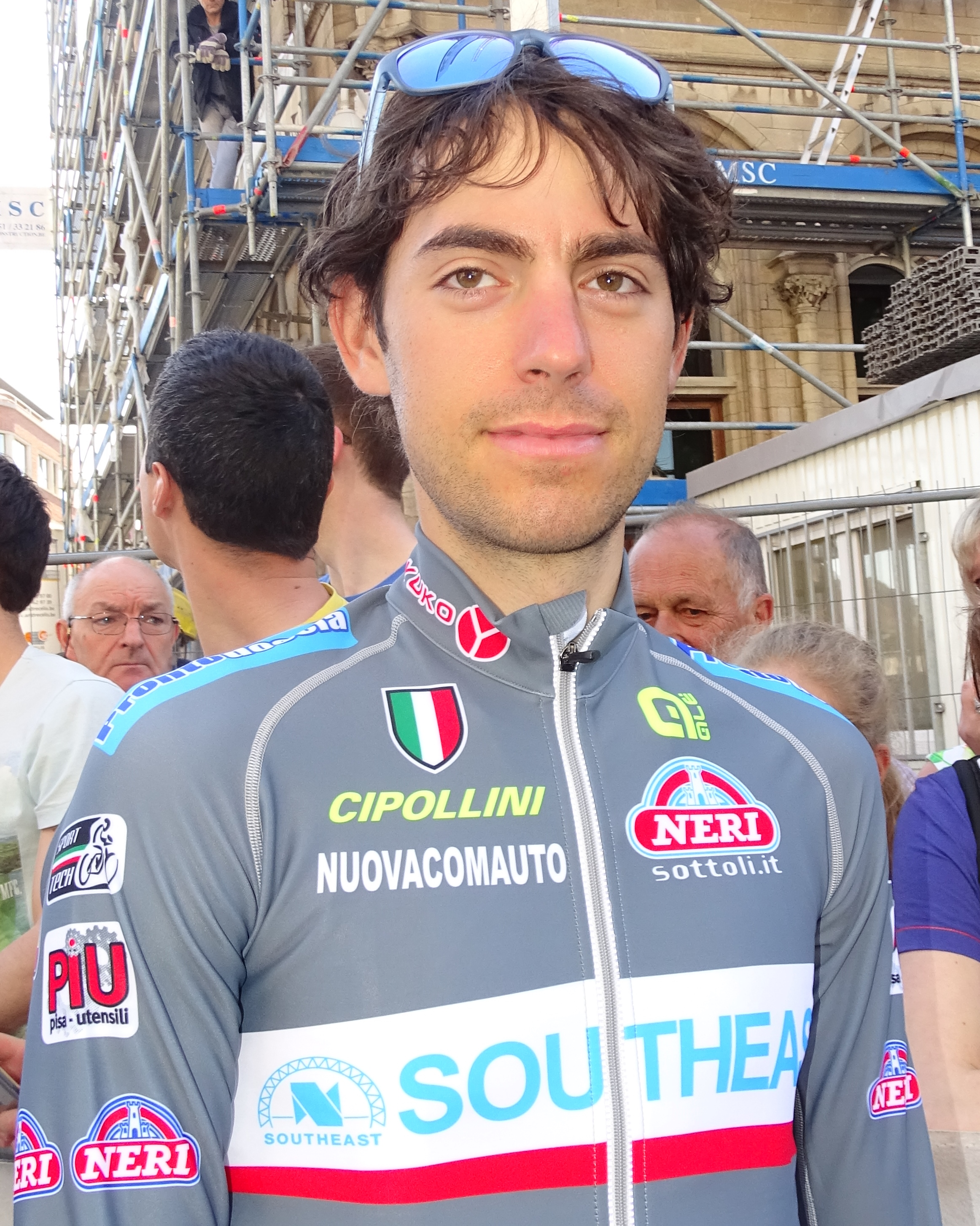 Reportage réalisé le mercredi 15 avril à l'occasion du départ de la Flèche brabançonne 2015 à Louvain, Belgique.